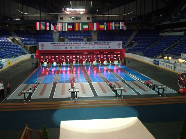 Posnetek kegljišča v dvorani Steel Arena v času Svetovnega prvenstva v kegljanju, Košice.